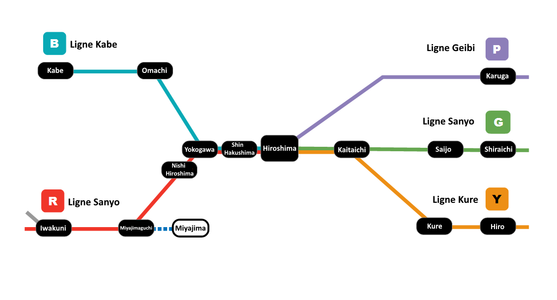 Carte du réseau d'Hiroshima